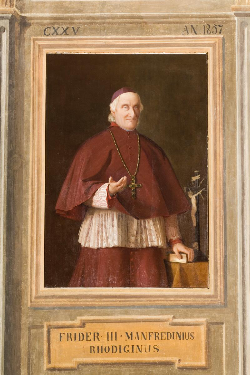 L. Papafava - Ritratto del vescovo Federico Manfredini - Sala dei Vescovi - Palazzo Vescovile - Padova